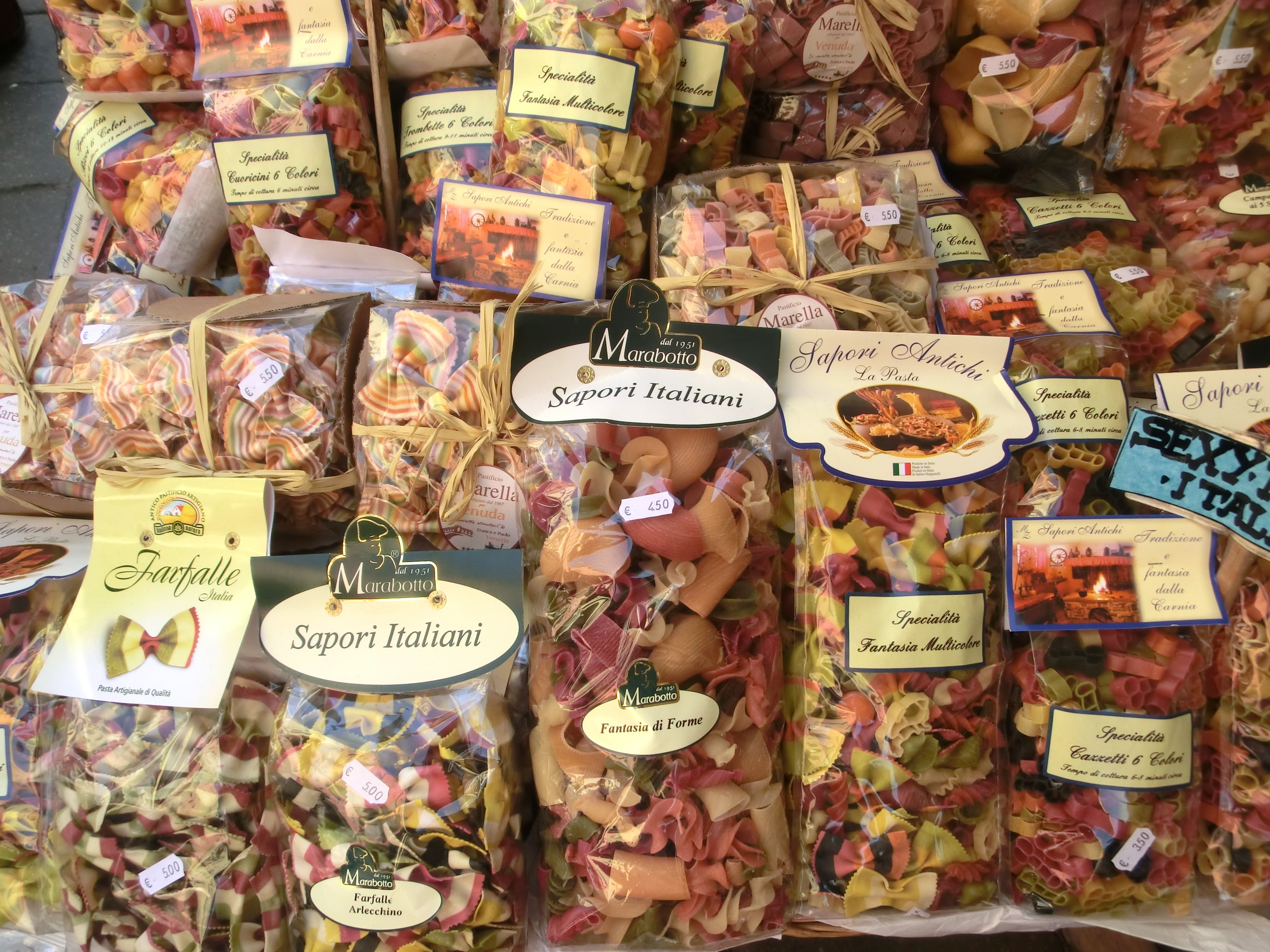 Vitrines de pâtes à Venise.